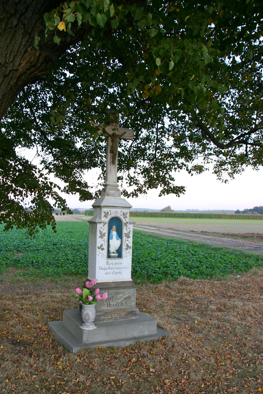 Kózki – wieś w Polsce położona w województwie opolskim, w powiecie kędzierzyńsko-kozielskim, w gminie Pawłowiczki.